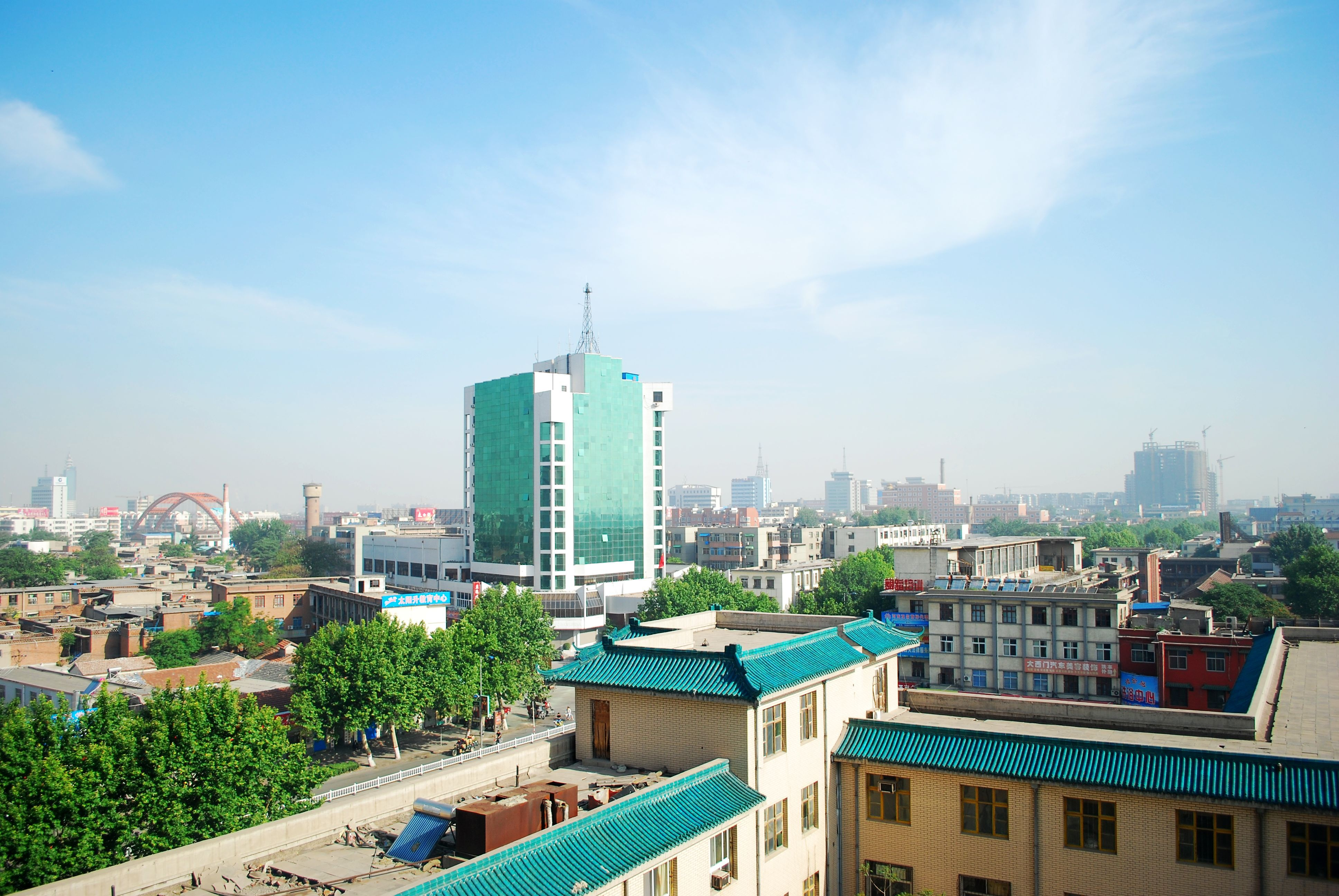 安阳